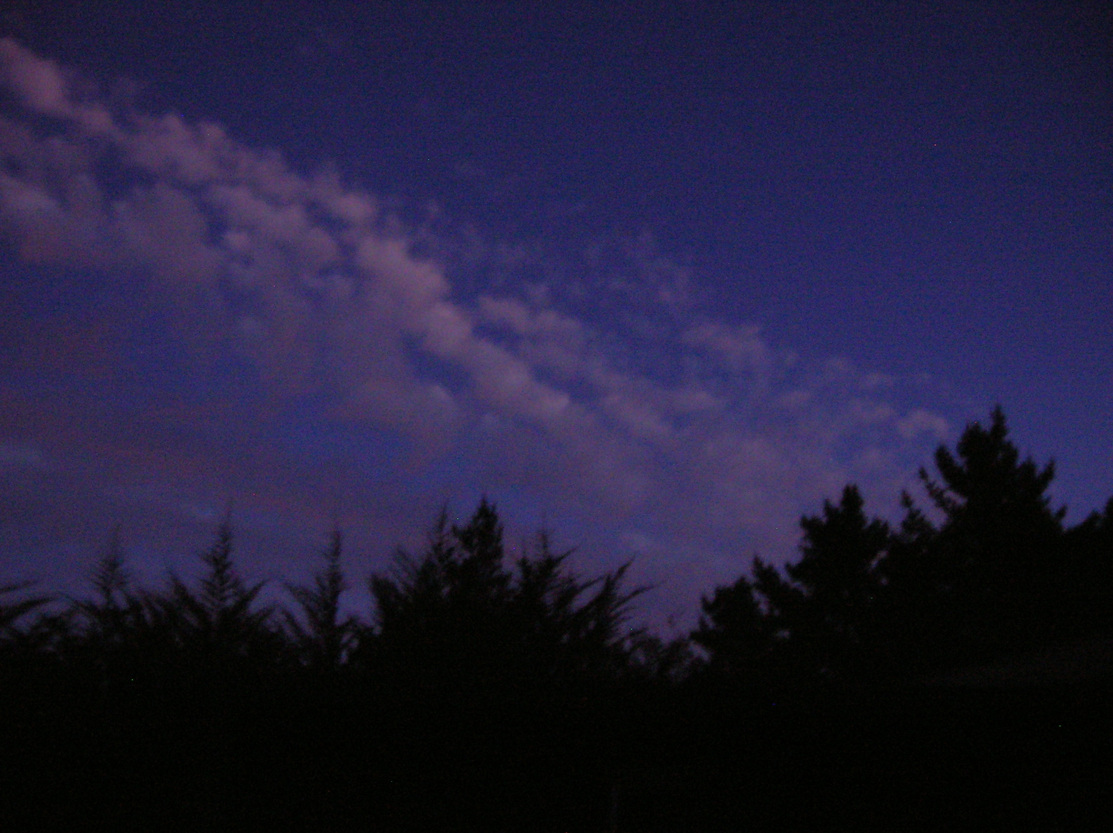 Curiosas nubes anarajandas en el cielo nocturno.